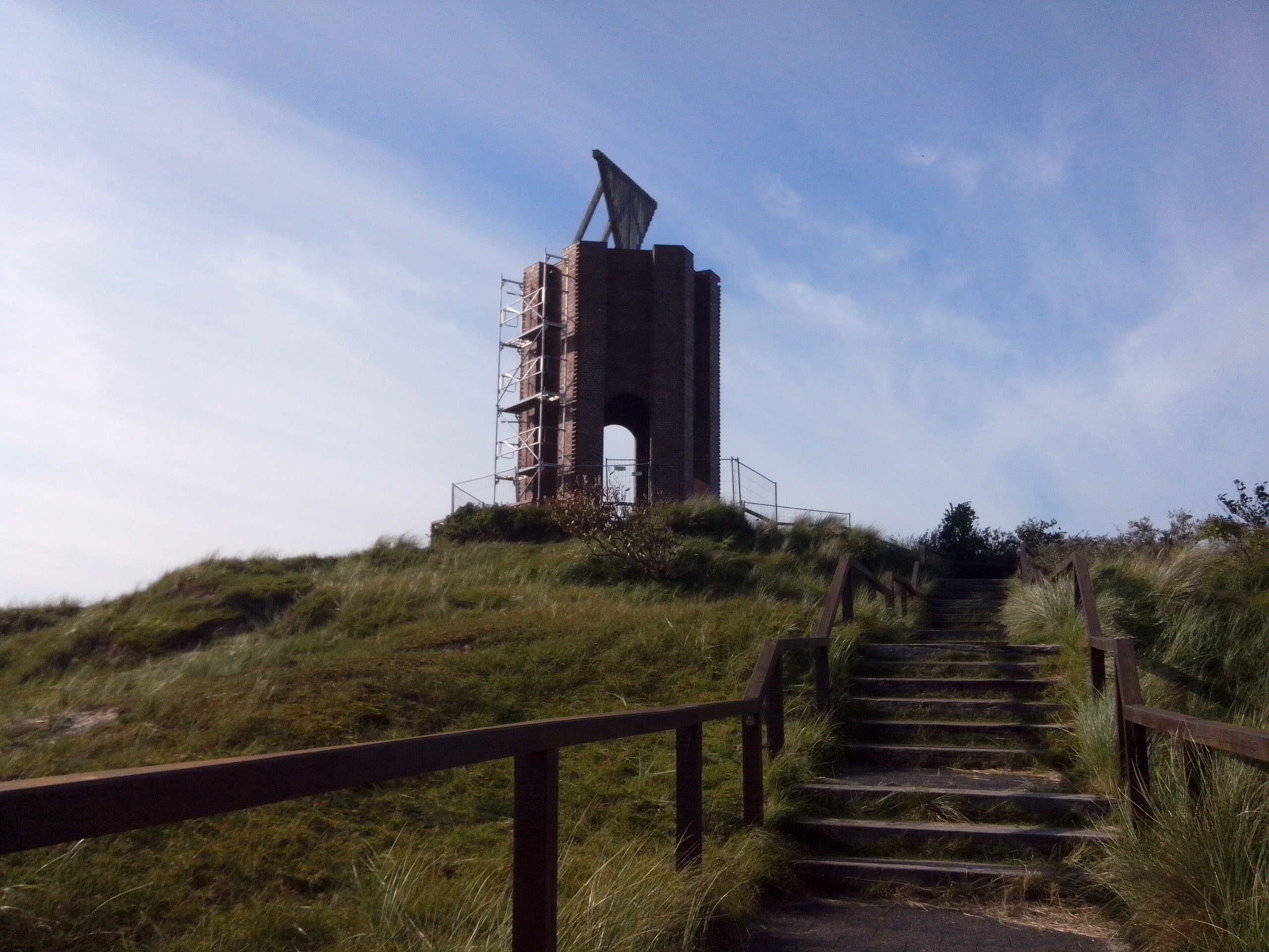 Norderneyer Kap im Oktober 2015